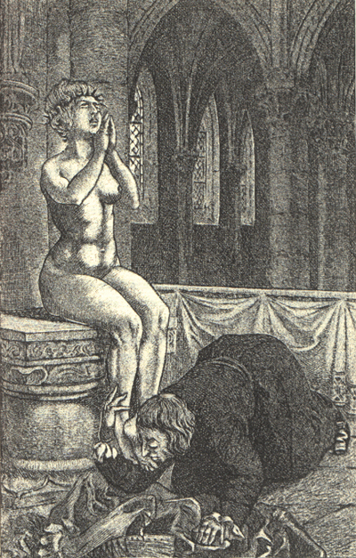 Dessins de Martin van Maële. Illustration de La sorcière, de Jules Michelet. 1911.